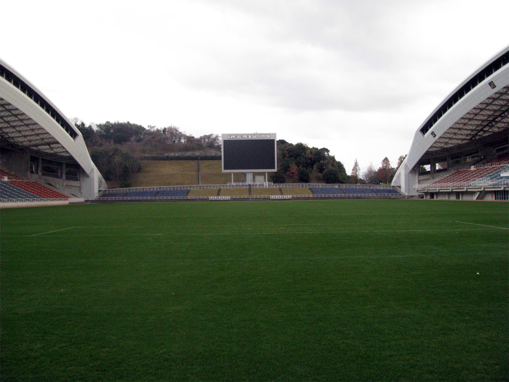 自身がレベスタにて撮影したもの